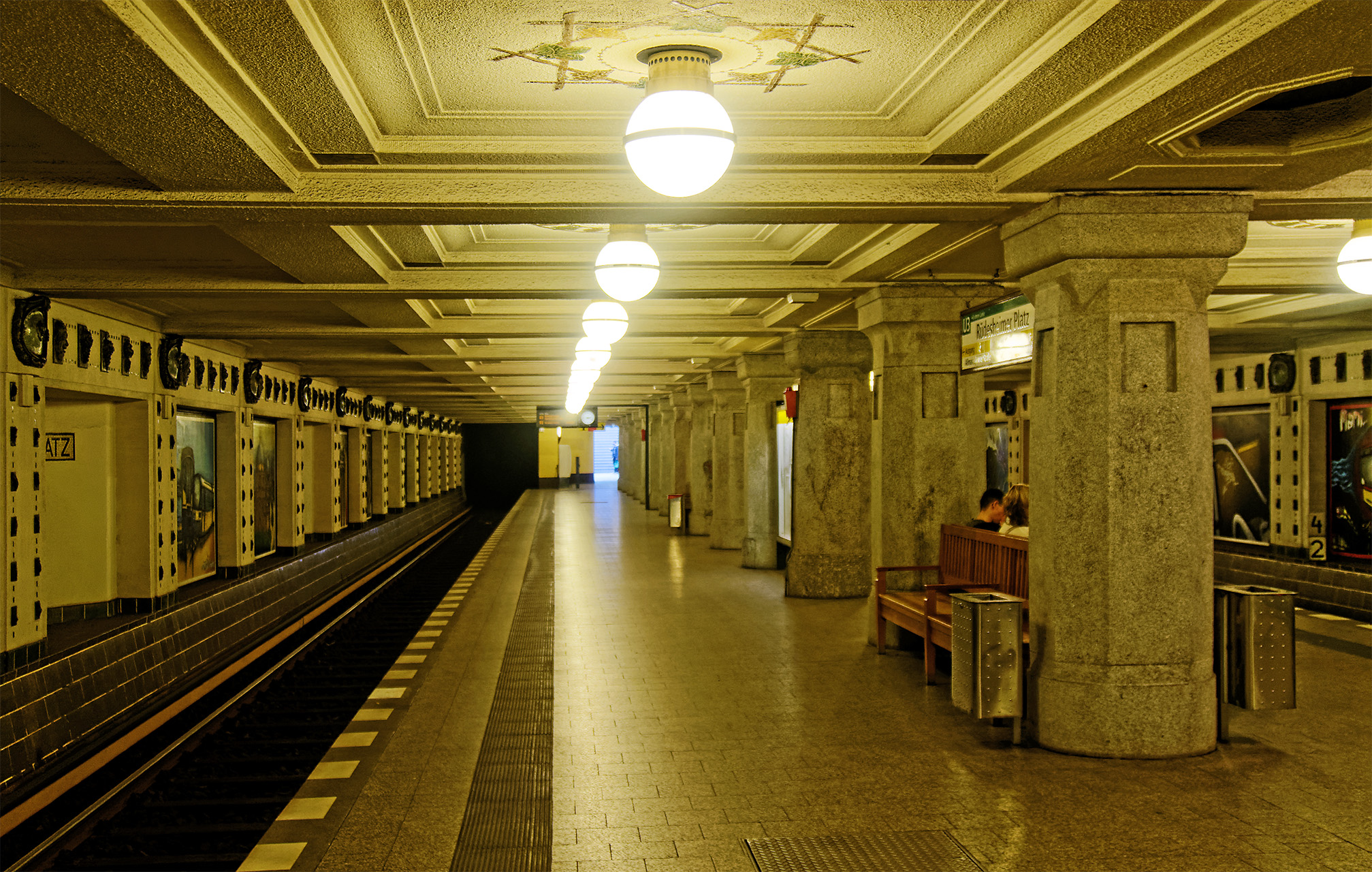 U-Bahnhof Rüdesheimer Platz in Berlin-Wilmersdorf auf der U-Bahnlinie U3 nach Krumme Lanke. Die Station wurde 1913 in Betrieb genommen. Auch die anderen Bahnhöfe auf der Linie U3 sind sehenswert, da die damalige noch selbständige Stadt Wilmersdorf ihren Reichtum zur Schau stellen wollte. (U3-Berlin7382 Dv3)This is a photograph of an architectural monument.